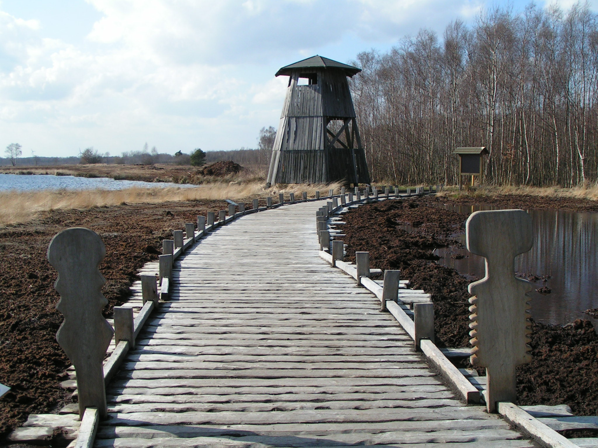 Großes Torfmoor zwischen Lübbecke und Hille: Bohlenweg und Aussichtsturm